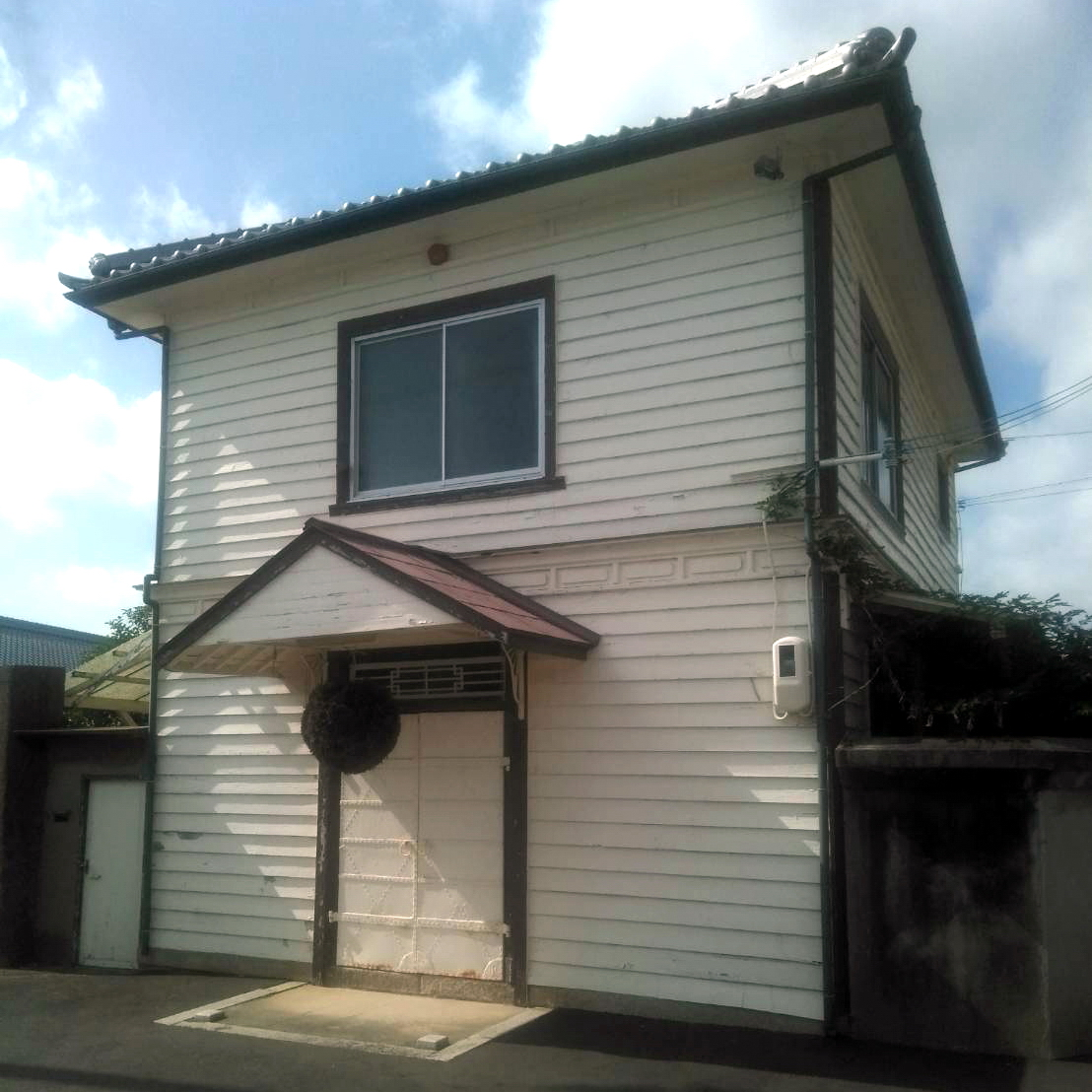 茨木酒造にある洋館